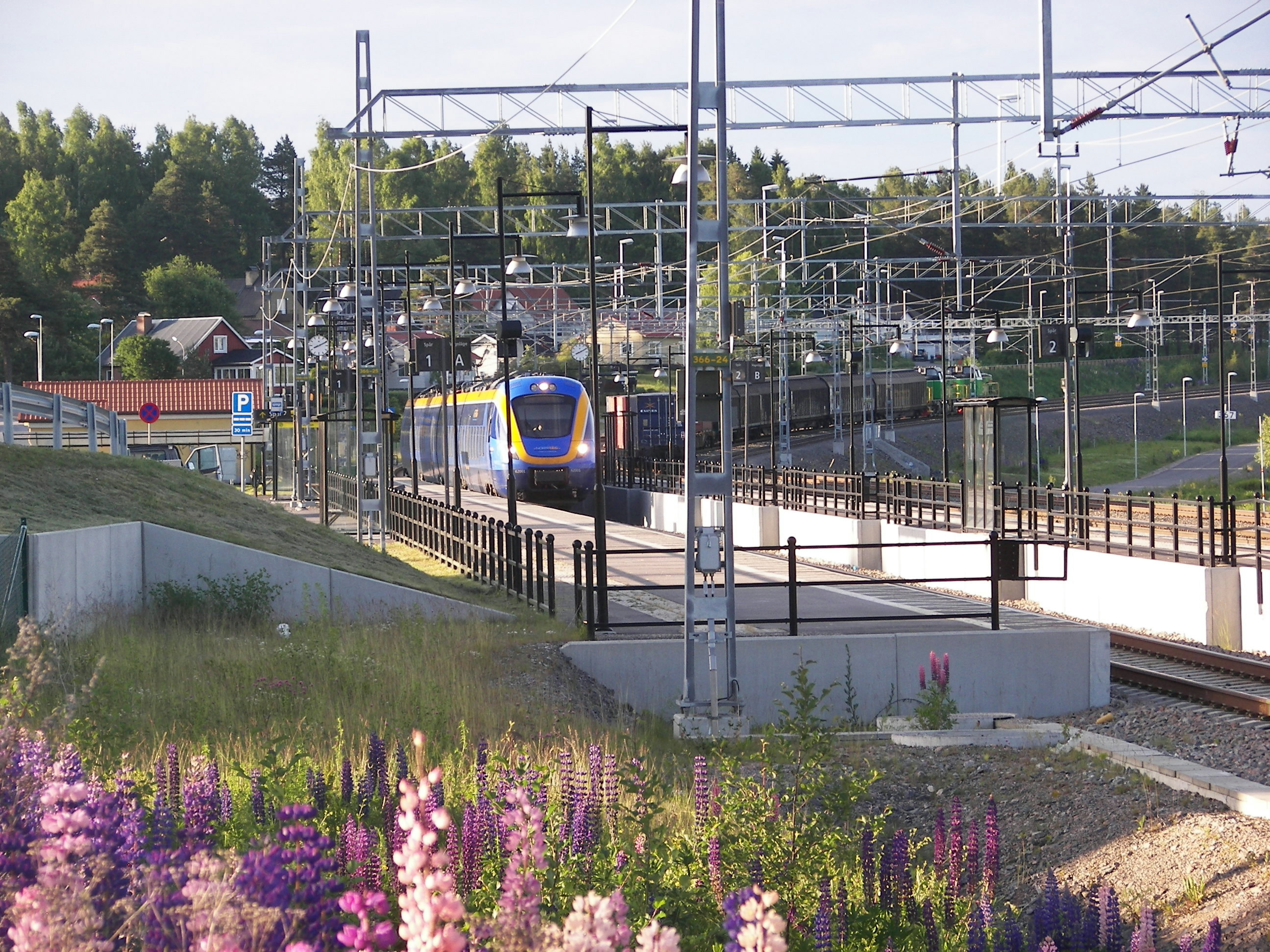 Timrå station, ankommande tåg från Härnösand (Norrtåg). Inväntande godståg inne på stationsområdet.